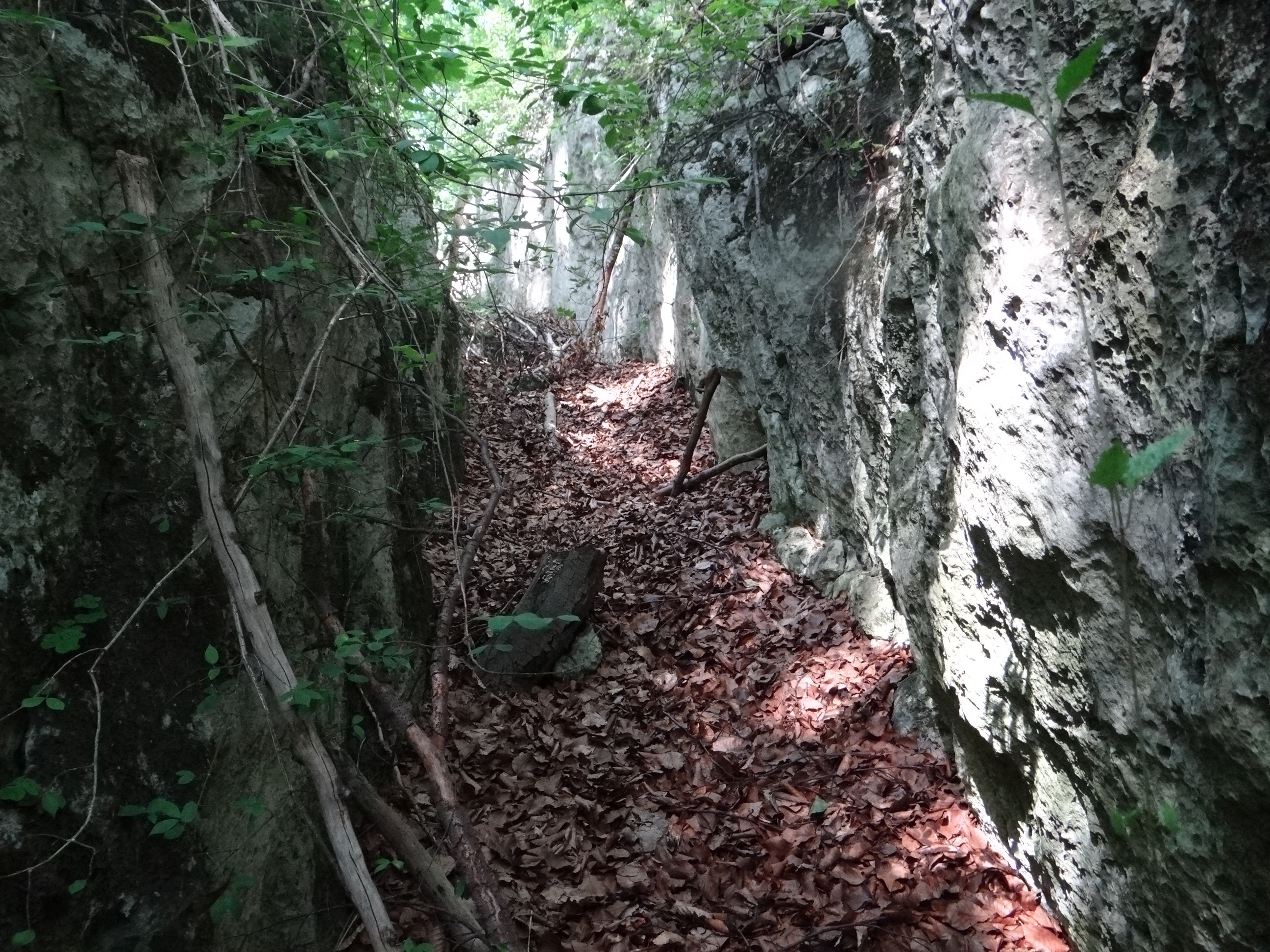 Rezerwat przyrody Pazurek